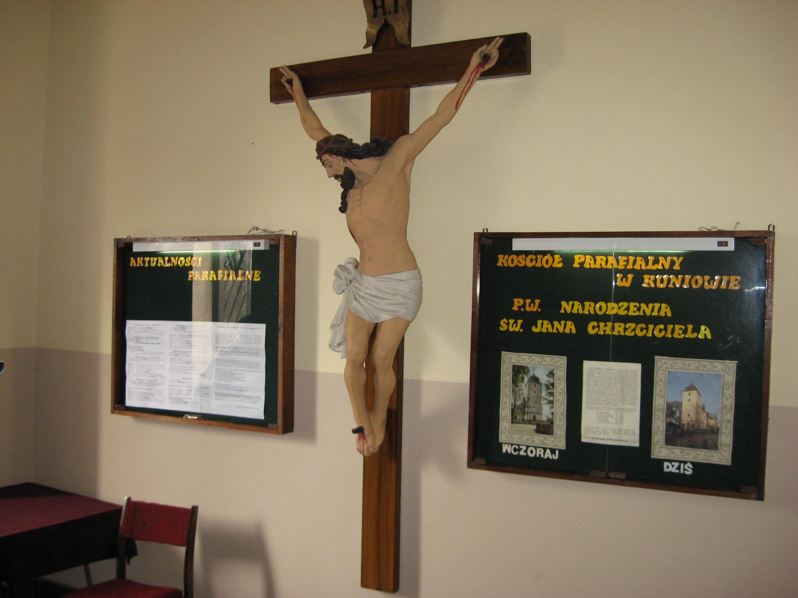 Kruchta